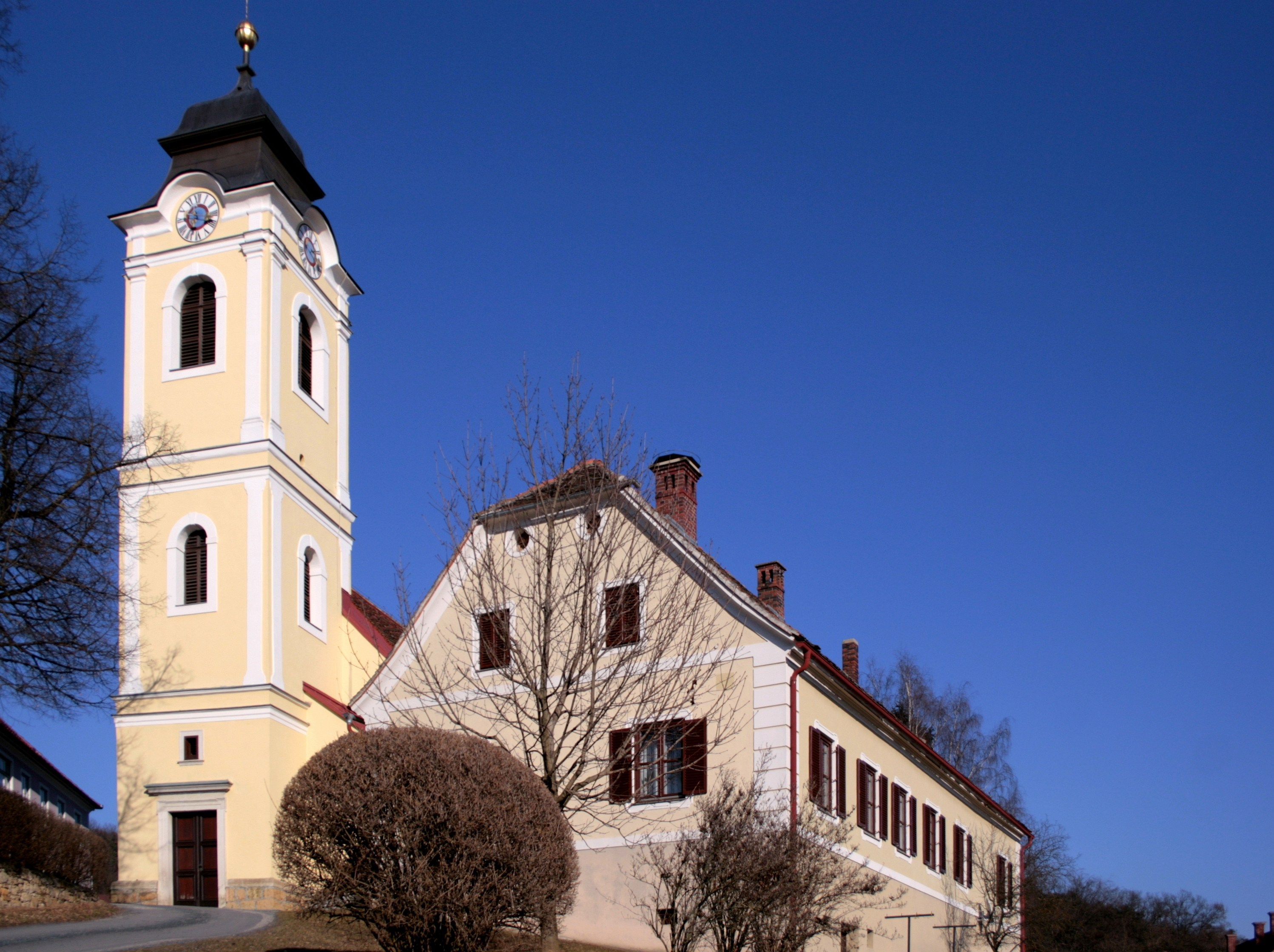 Sant Johann in der Haide Pfarrhof